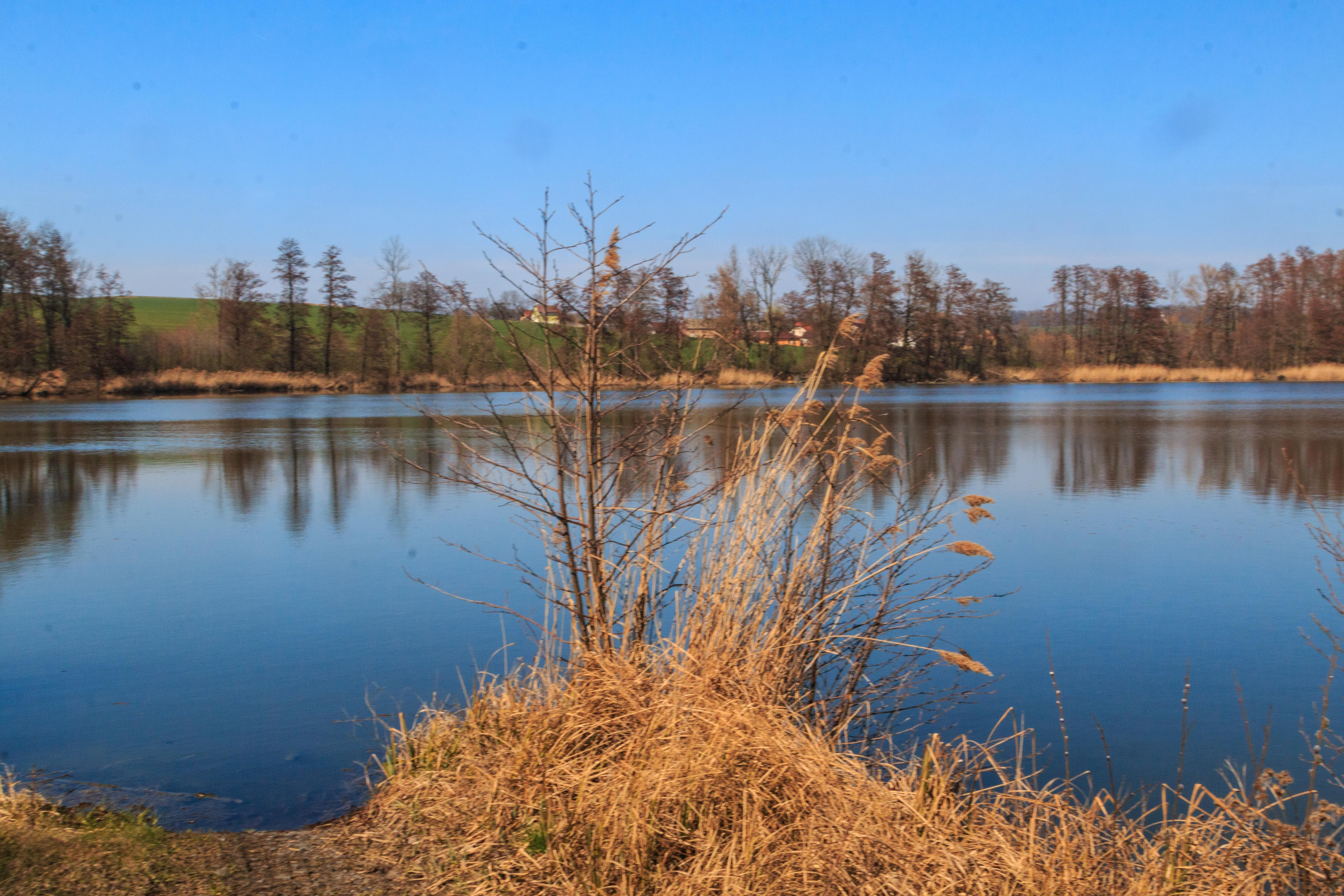 Rybník Šlejferna